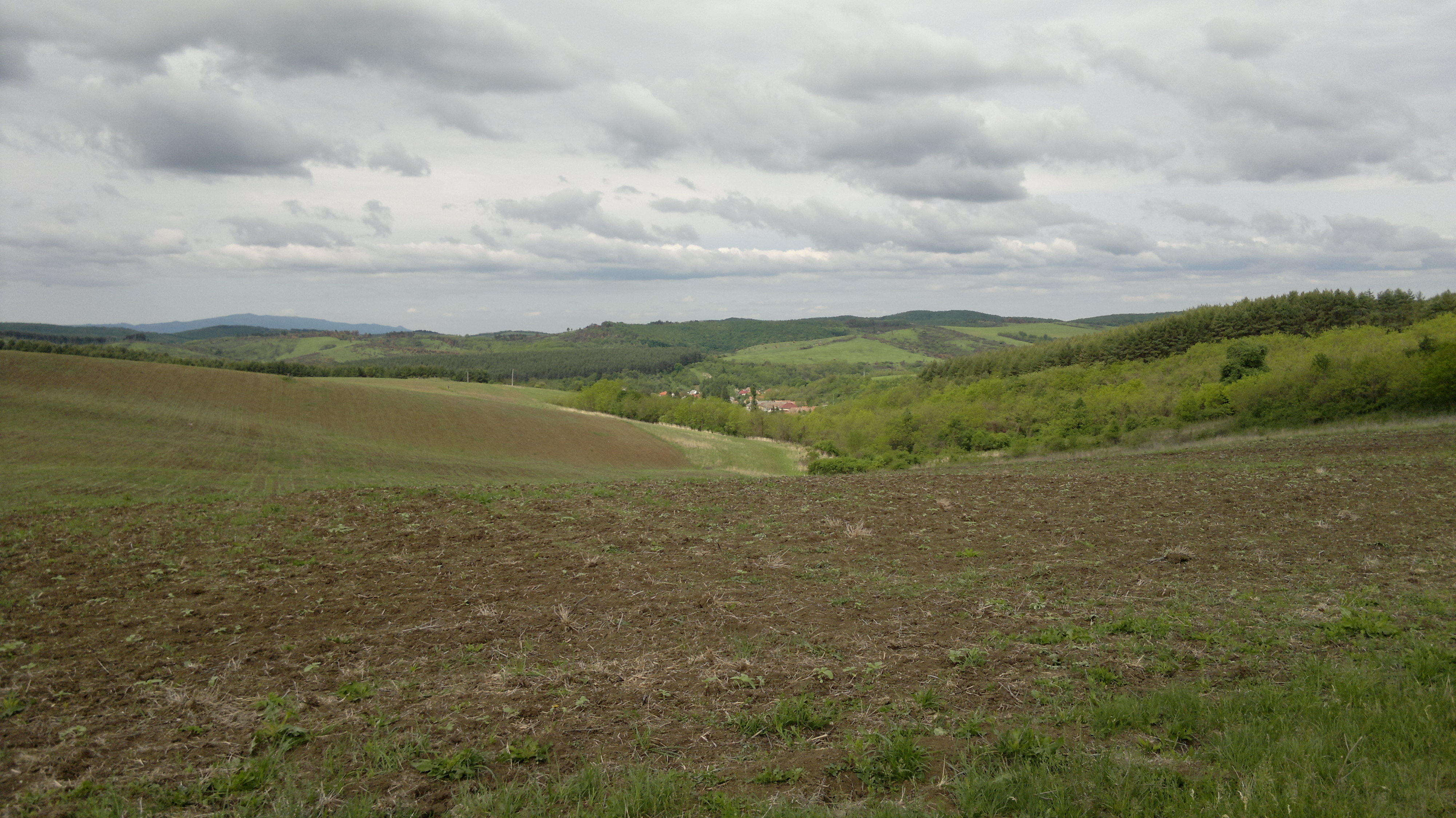 Egerbocs a Rákostetőről